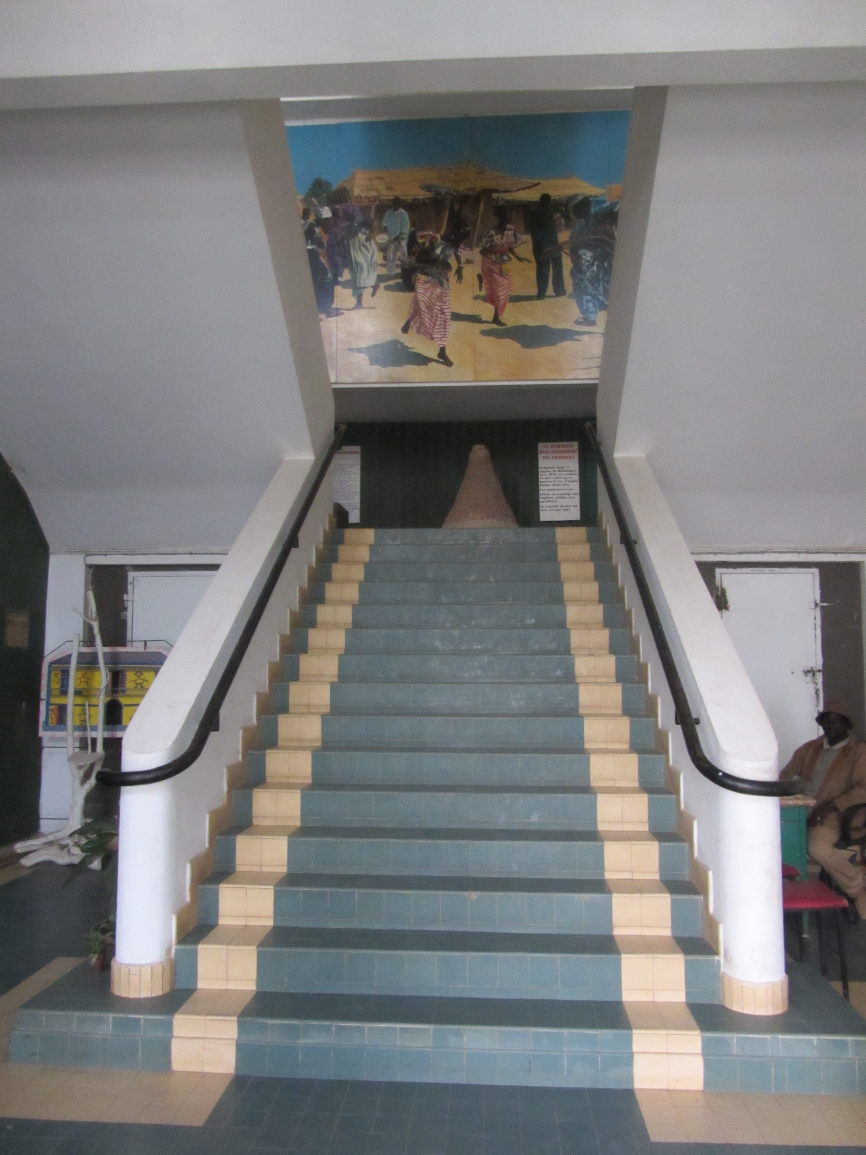 This document was produced using the Canon PowerShot SX230 HS lent by Wikimedia France. Saint-Louis : Musée du Centre de Recherches et de Documentation du Sénégal, escalier central